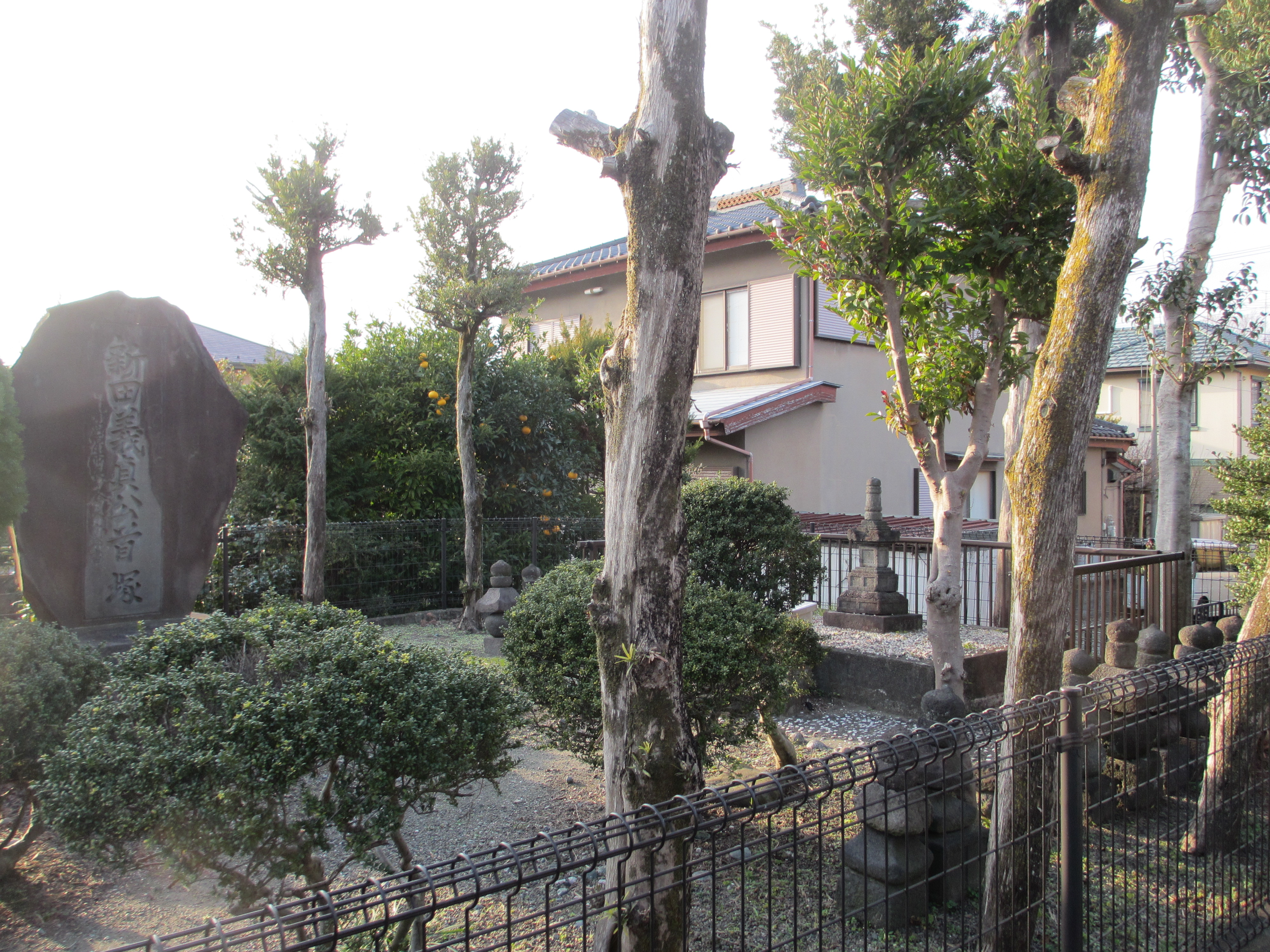 小田原市東町4‐5小田原東高校前バス停近く国道1号線から海岸の方へ少し入った児童公園